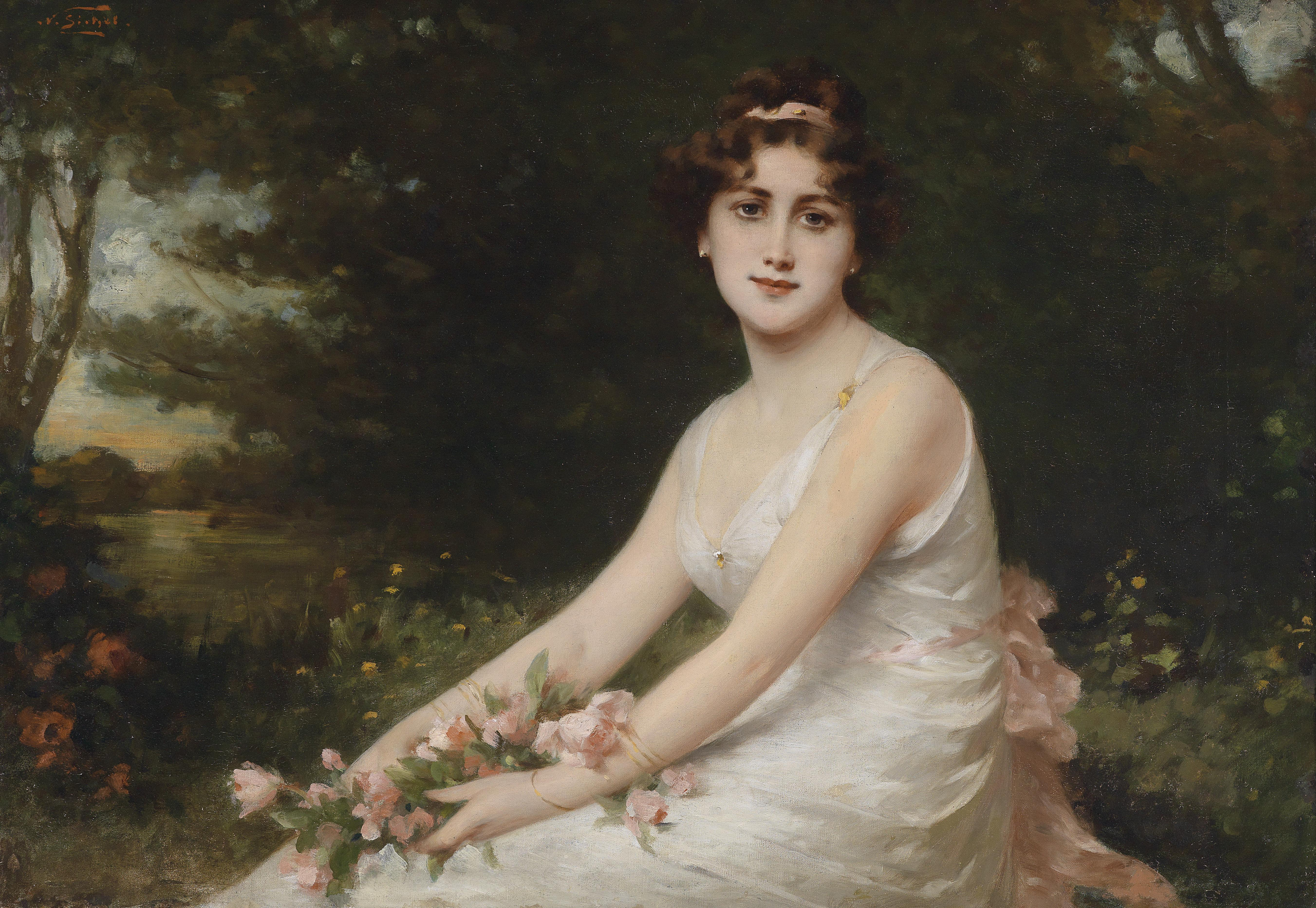 Junge Dame mit Rosen am Seeufer, signiert N. Sichel, Öl auf Leinwand, 47,5 x 67,5 cm